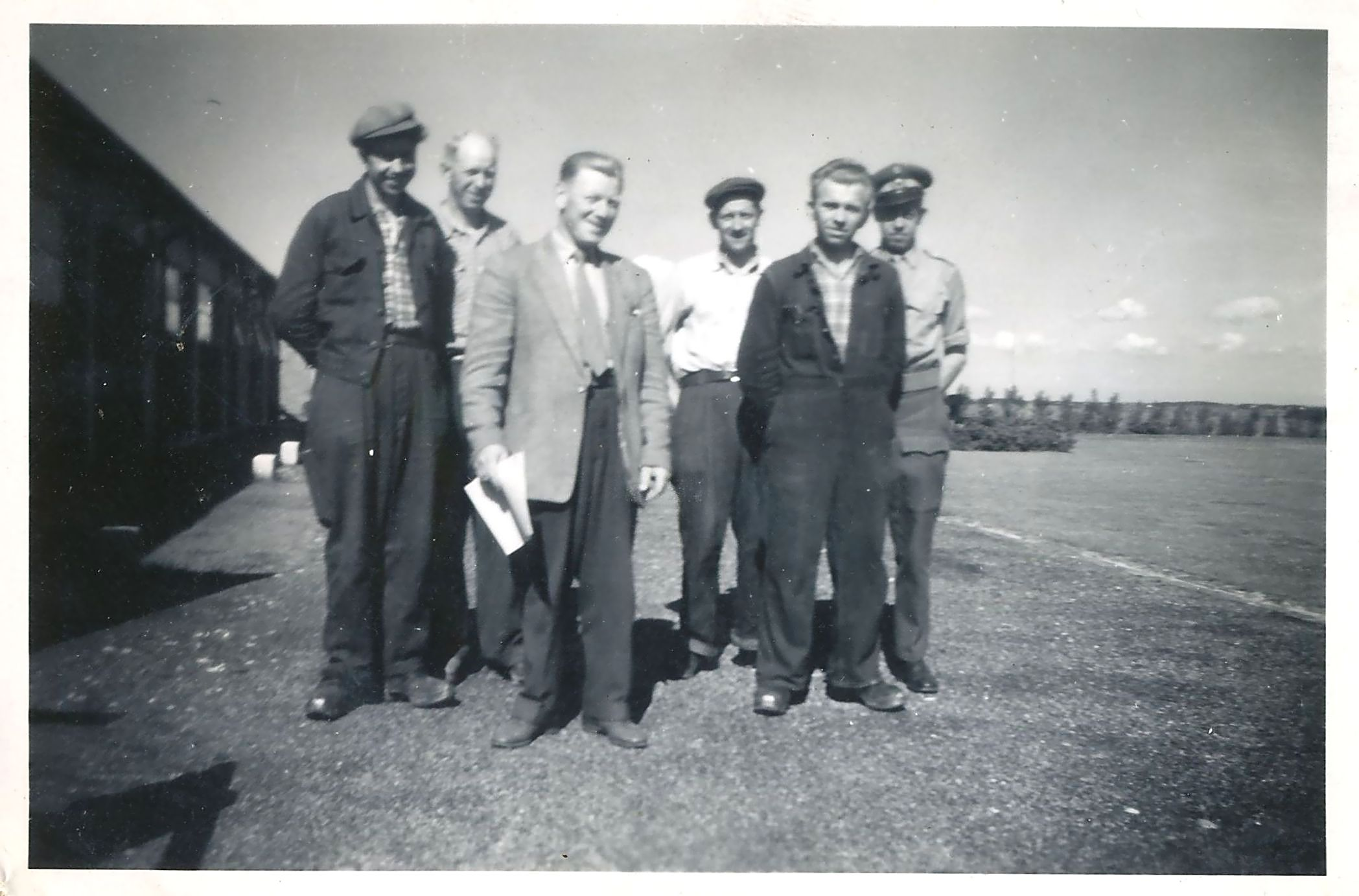 Militærdepotet 'Hammer Depot' i 1958. På billedet ses de fleste af medarbejderne, fra venstre til højre: Civilarbejder Gunnar Jensen, Civilarbejder Ejnar Bitsch, Materielforvalter Jens Christian Pedersen, Civilarbejder Kaj Petersen, Civilarbejder Kaj Hansen, Materielforvalter N.C.C. Hem.